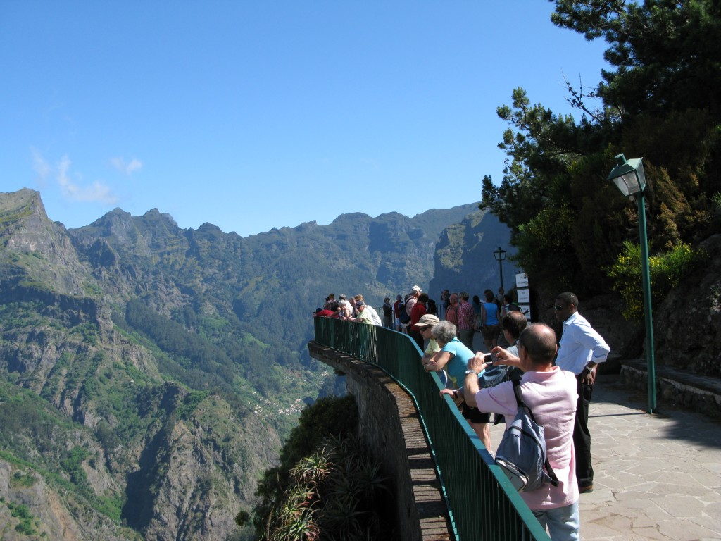 Curral das Freiras, Madeira 2008.